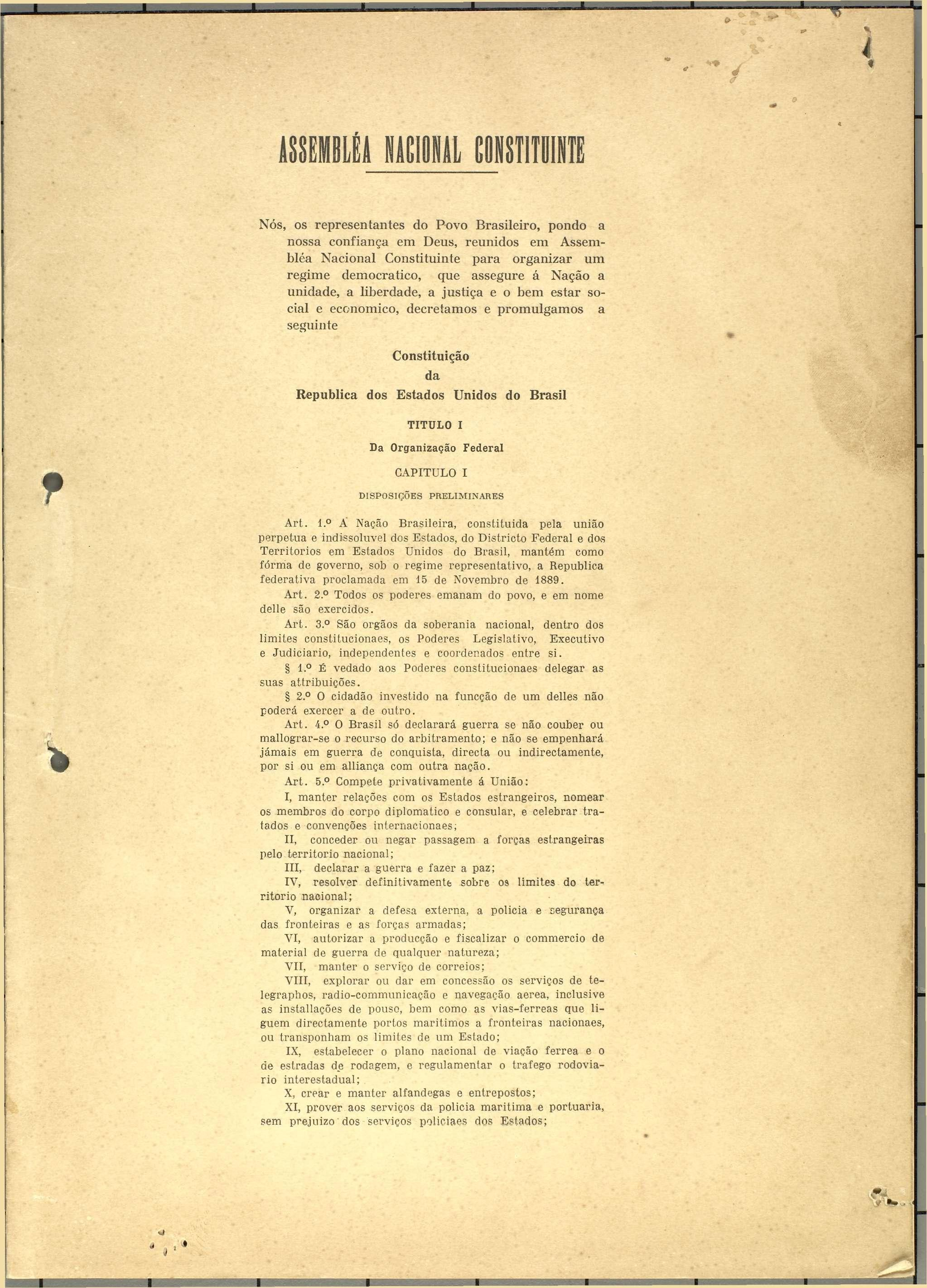 Página 01 da Constituição da República do Brasil, de 1934.